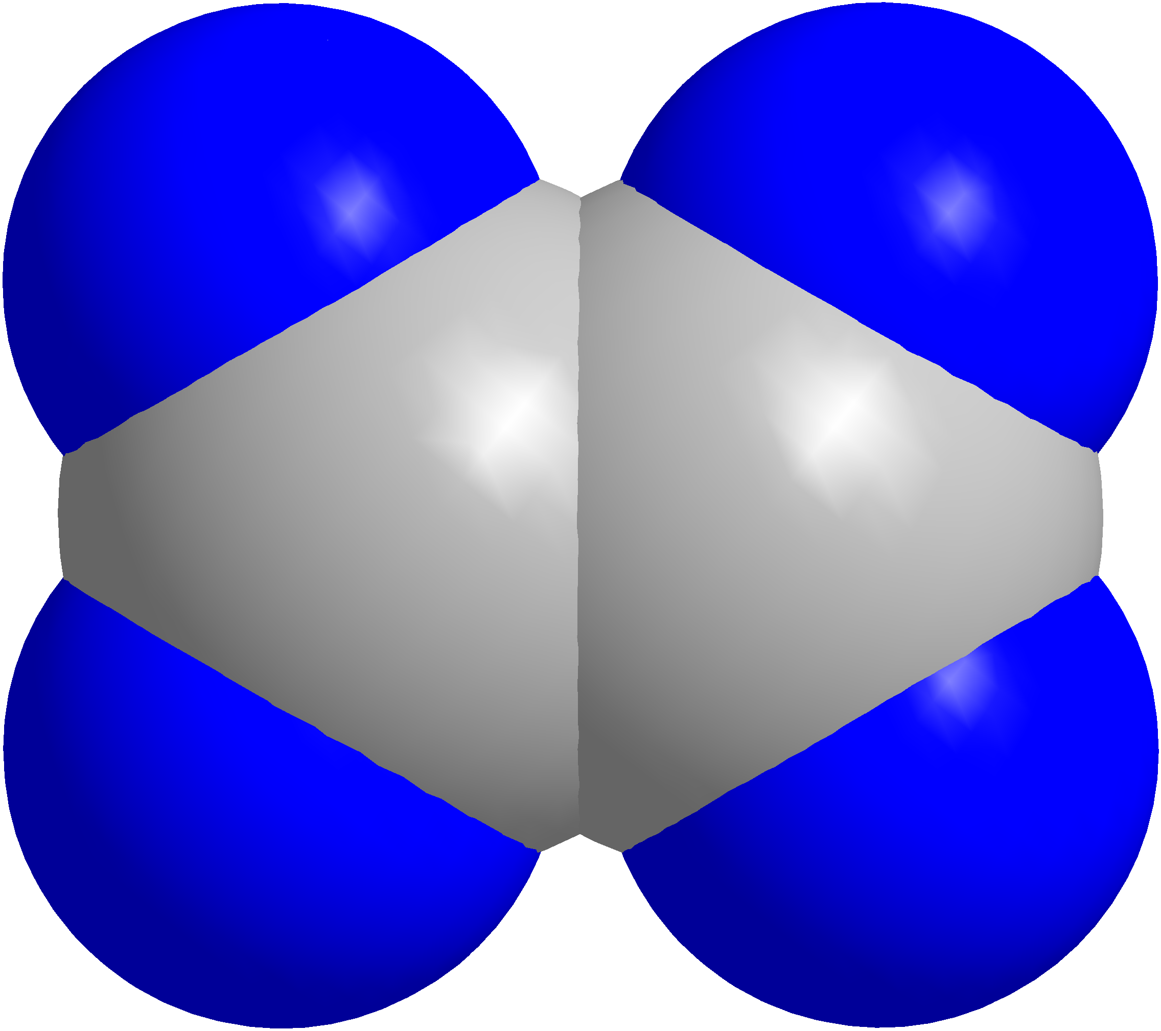 Etenin Uzay Dolgu modeli